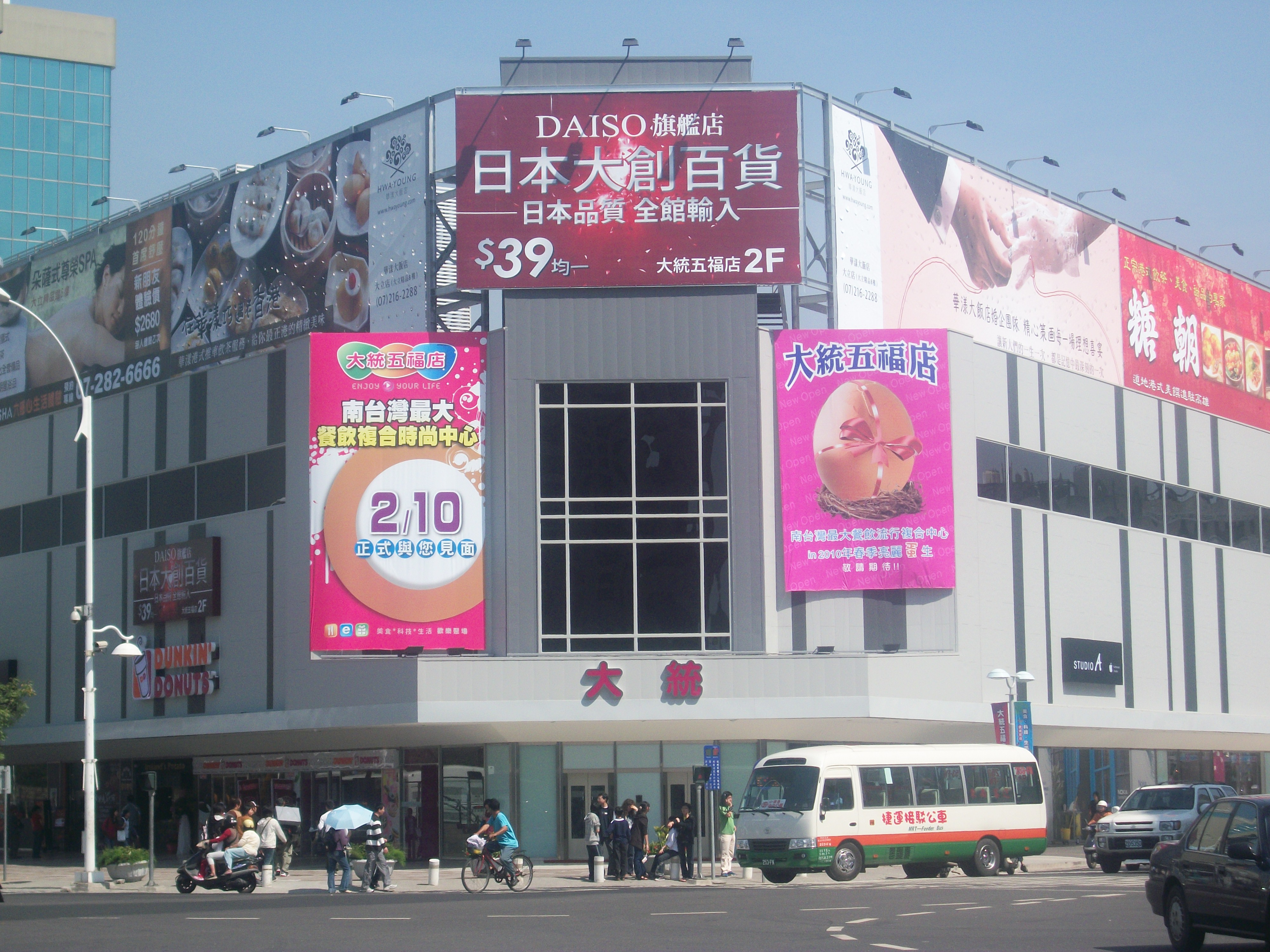 中文（台灣）: 高雄市大統百貨五福店